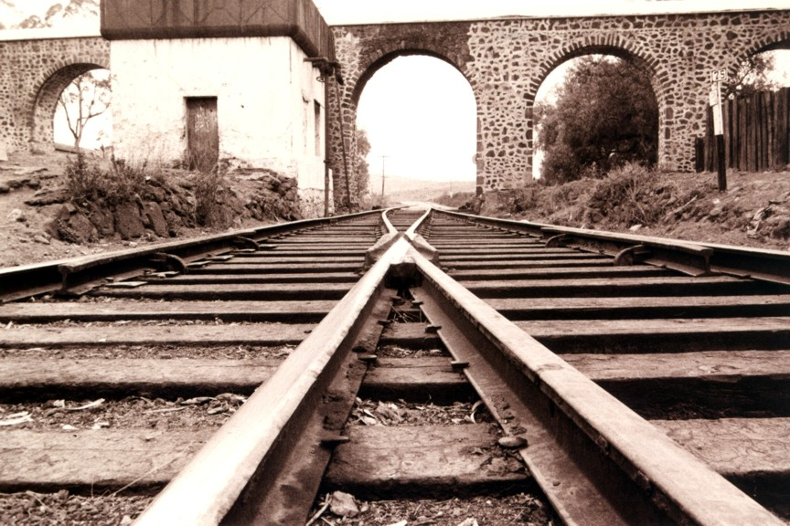 Entre rieles y durmientes